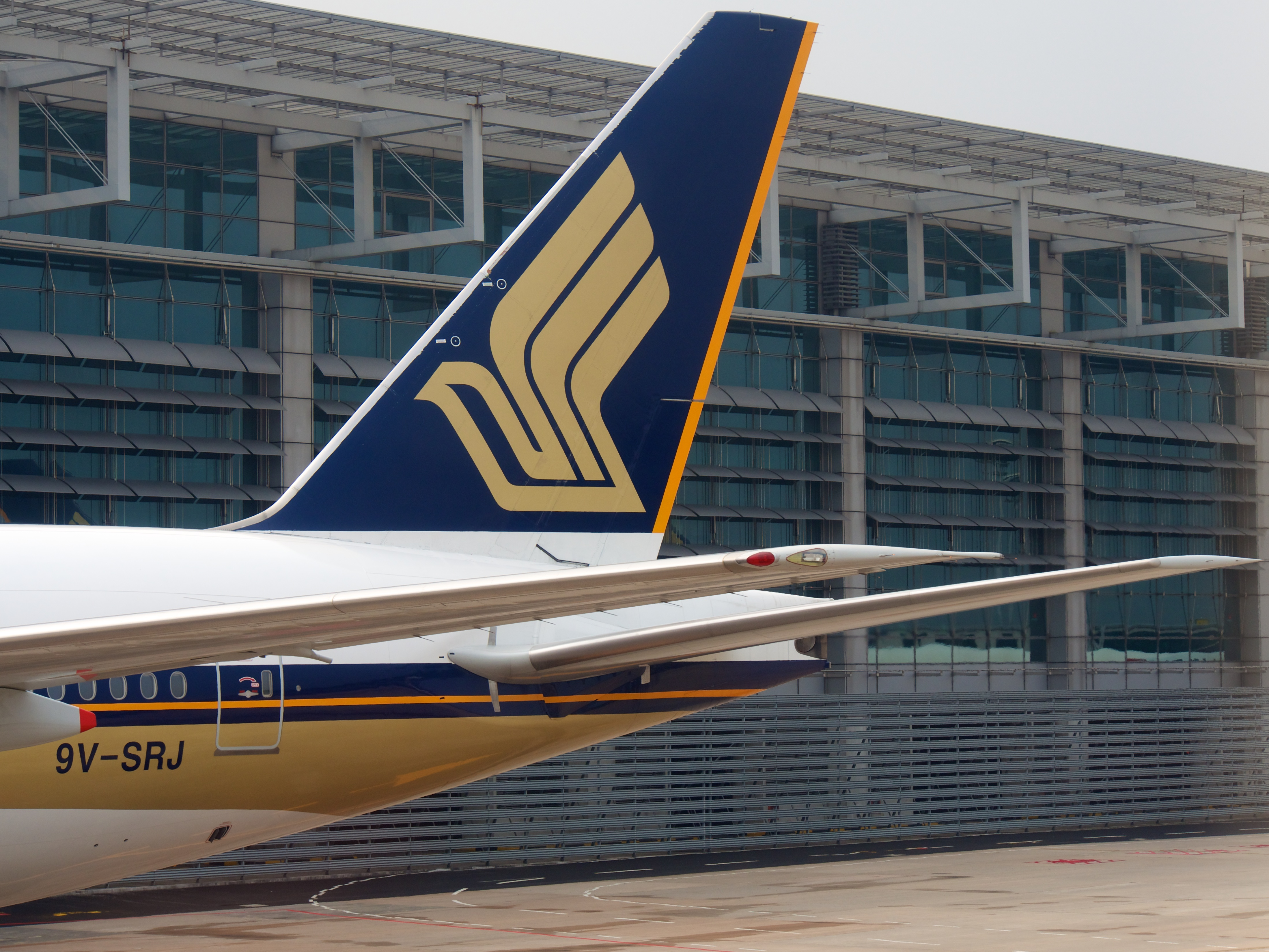 9V-SRJ | 777-212ER | Singapore Airlines | Changi Singapore